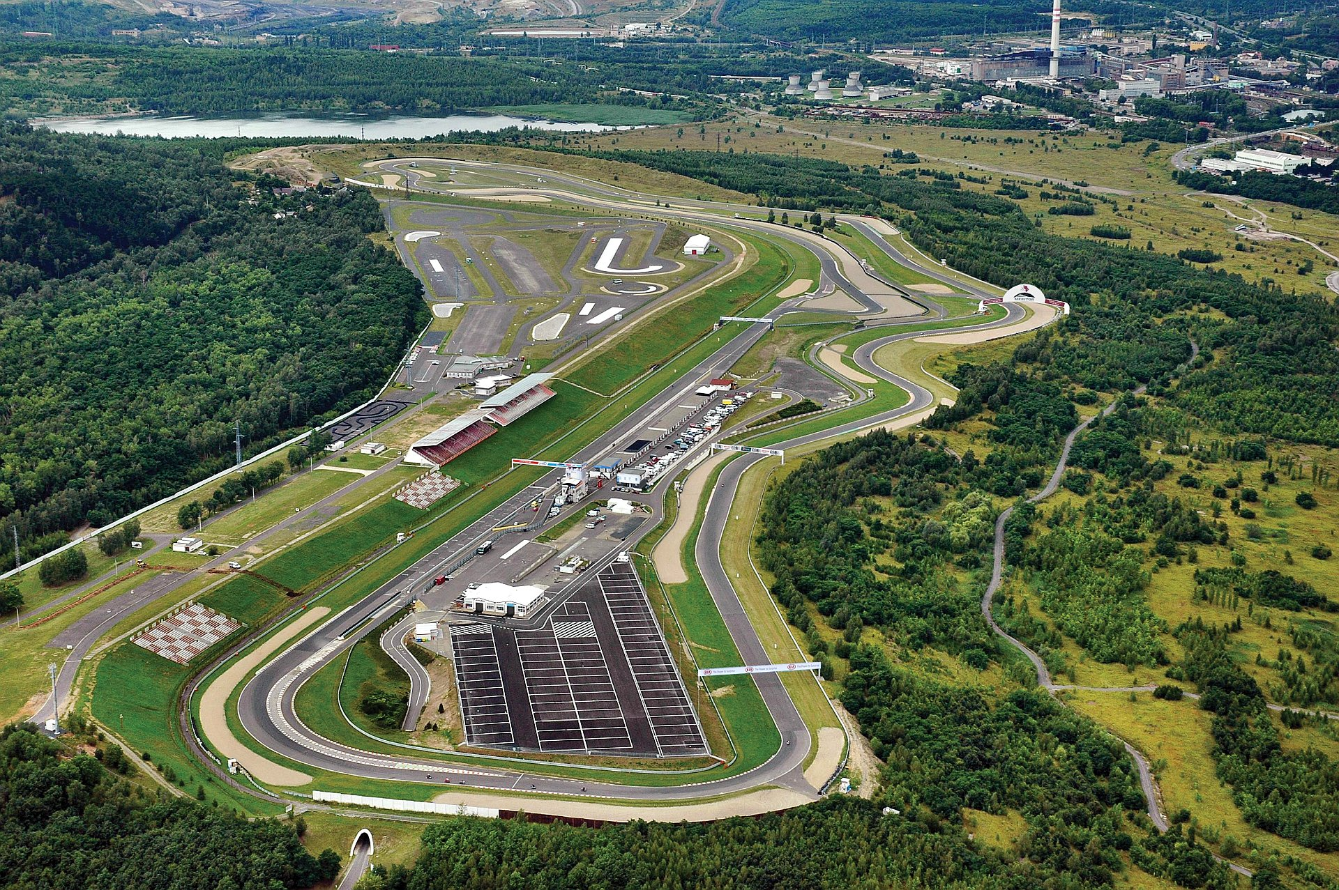 Das Areal des Autodrom Most aus der Vogelperspektive